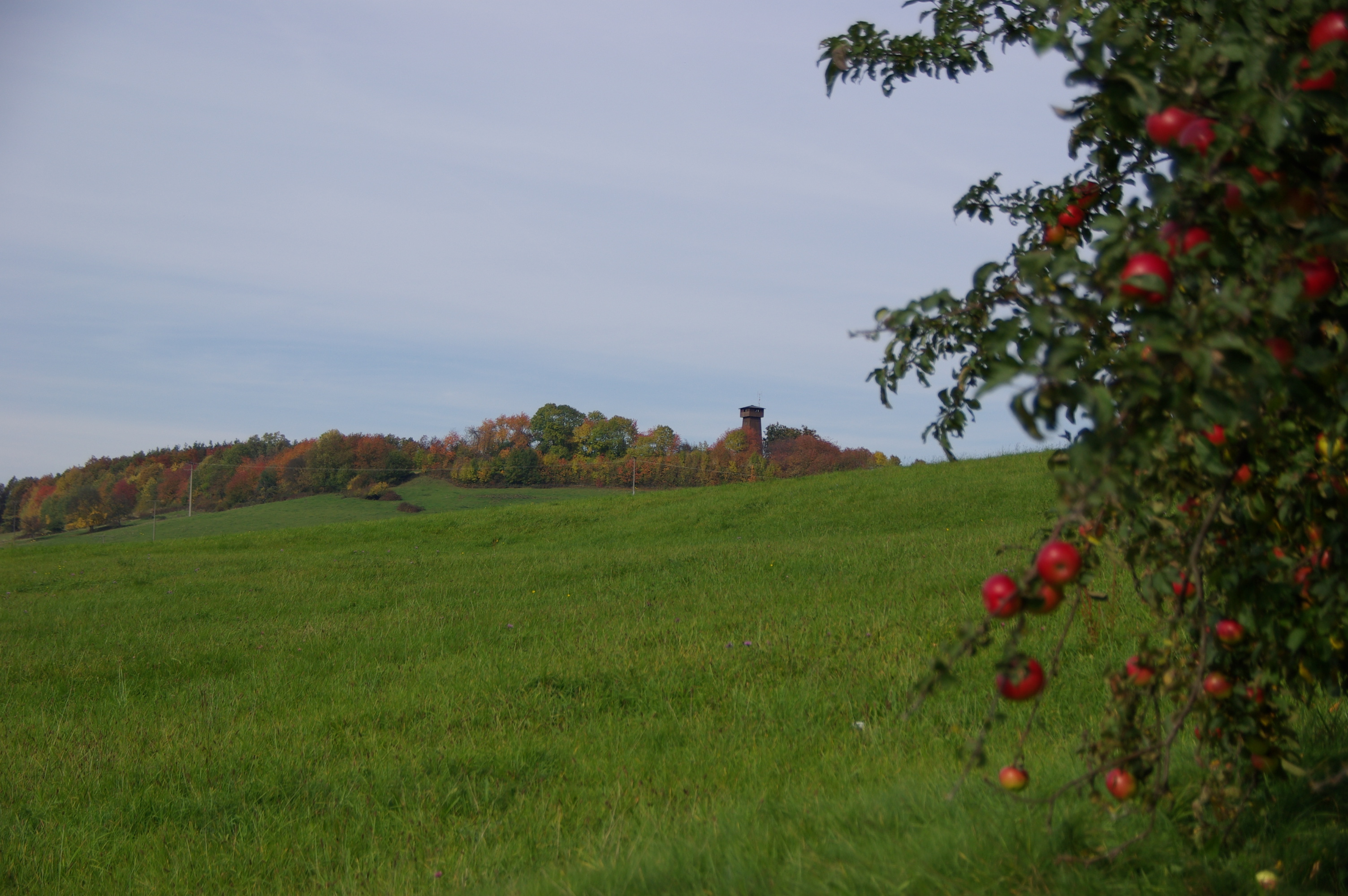 Herbst 09-1 Blick zum Juxkopf